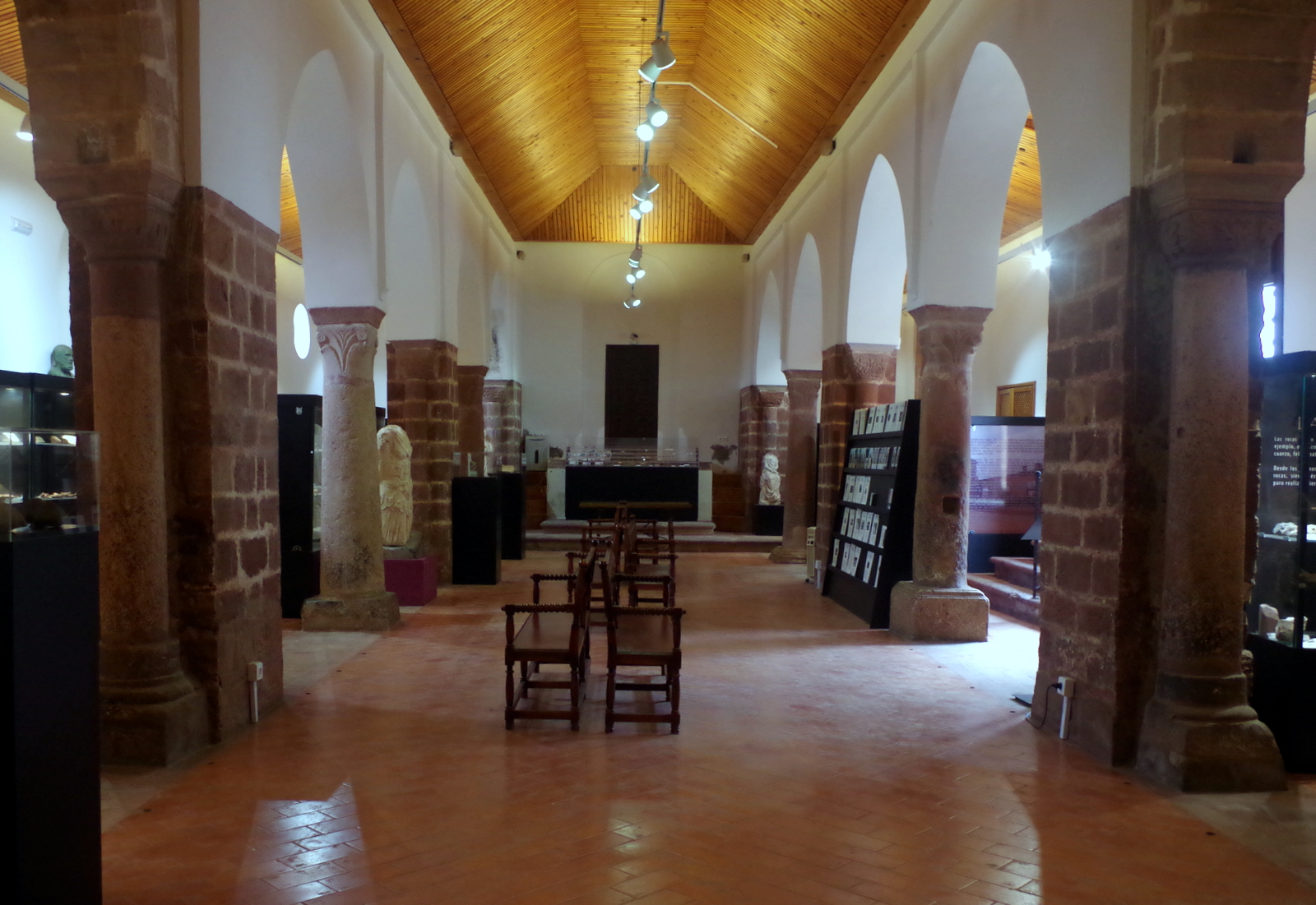 En la antigua iglesia de Santa María de la Mota. Vista desde los pies.